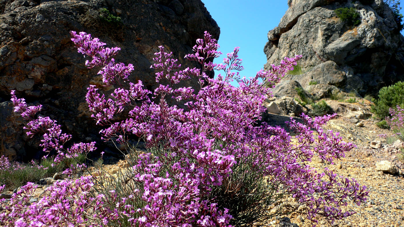 Limonium insigne en Cabo Tiñoso. Parque natural de la Sierra de la Muela en Cartagena (España)